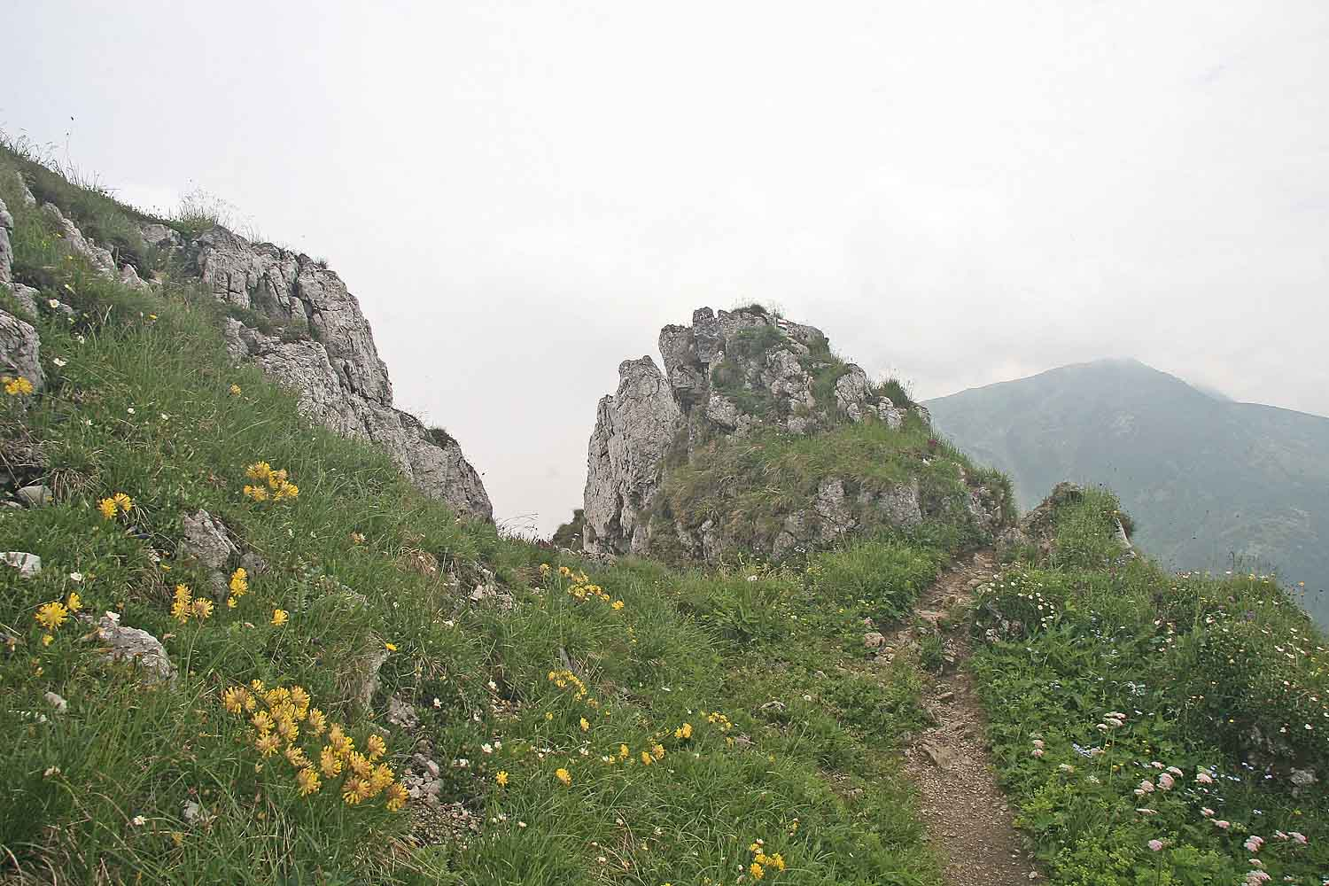 Malý Kriváň, Malá Fatra, district Žilina, Slovakia Autor:Prazak date: 29. 6. 2006